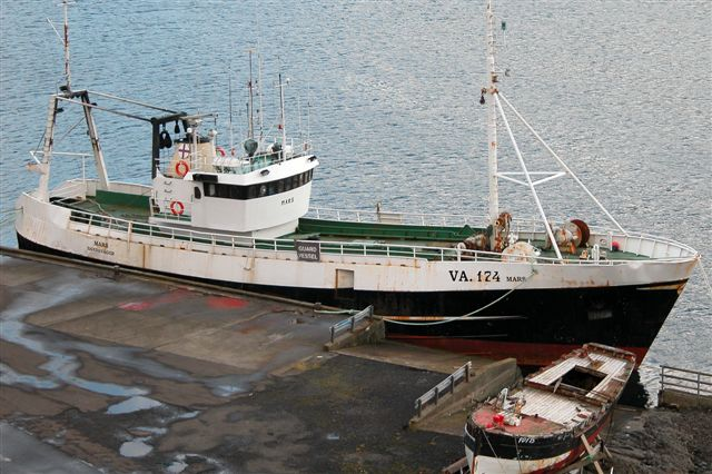 Faroese trawler